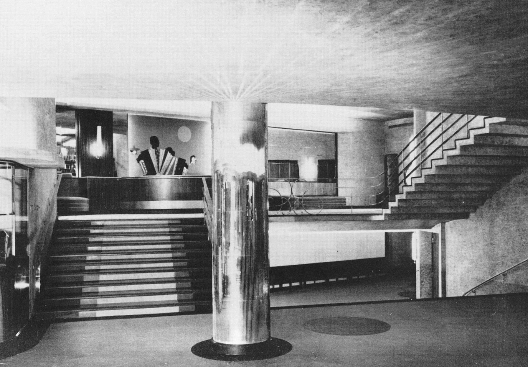 Entréhallen till biografen "Rival" i Stockholm